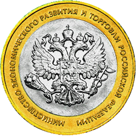 Юбилейная монета. 2002г. 10руб. Министерство экономического развития и торговли. Реверс.